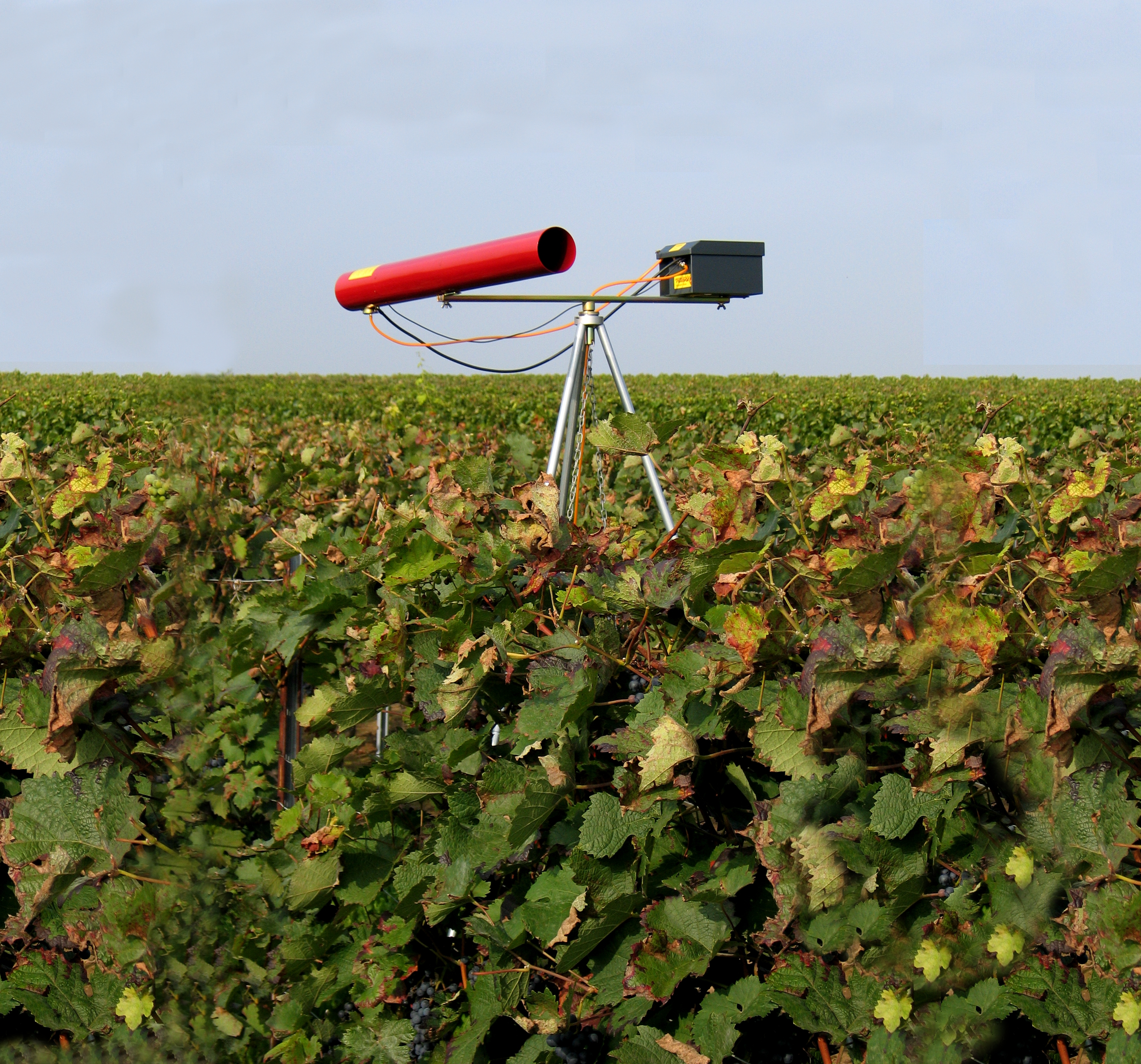 Gas Knallschreckgeräte Weinbau zur Vogelabwehr (Stare)